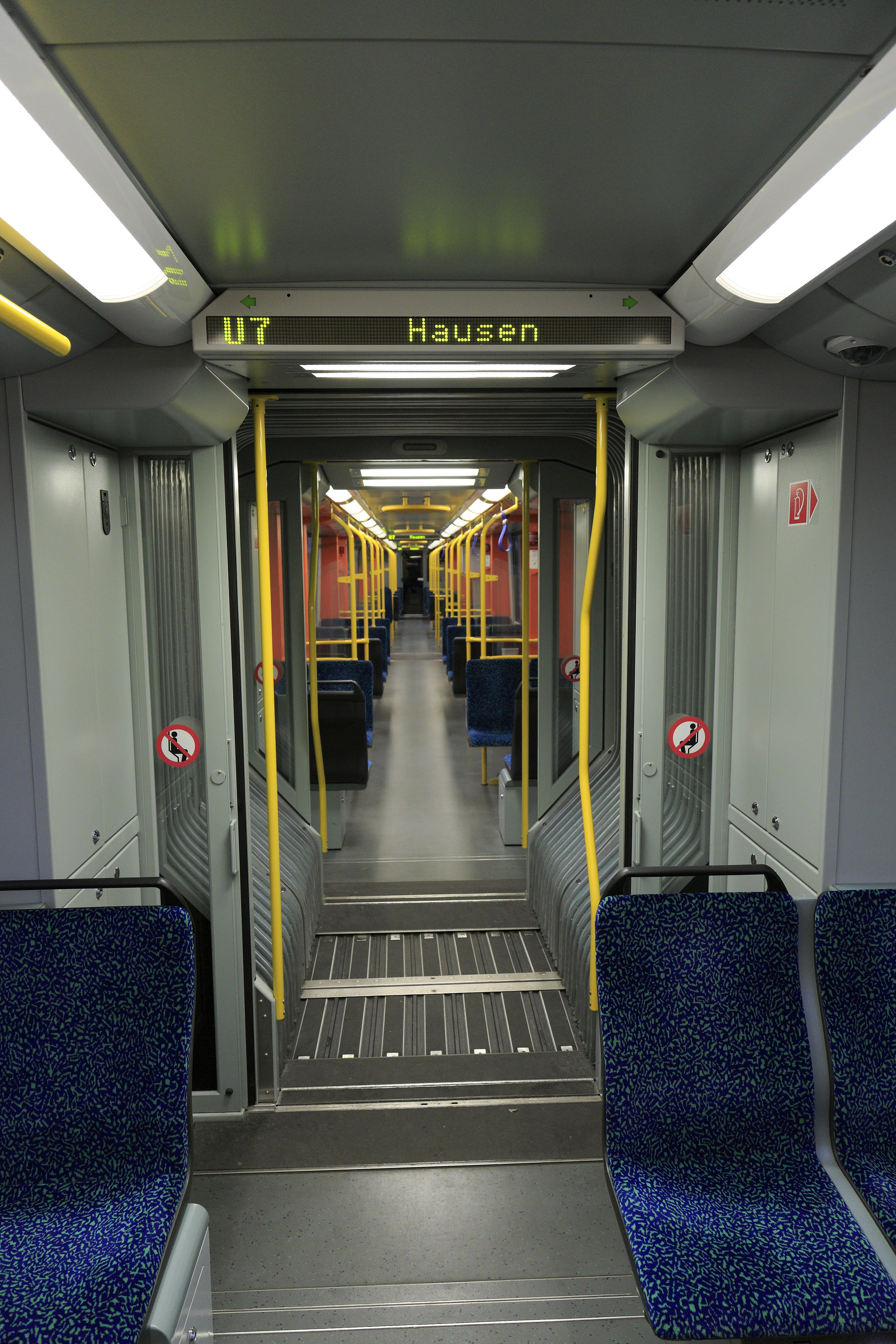 Wagenübergang von Triebwagen der VGF-Reihe U5-50. Wegen der straßenbahntypisch engen Bögen sind Gummiwülste mit klassischen Übergangsbrücken nicht nutzbar. Die Konstruktion erinnert an die ICE-Wagenübergänge, allerdings ist diese Bauart eben wegen der engen Bögen deutlich länger. Zum Schutz vor Verschmutzungen ist der Wagenübergang mit Schiebetüren verschließbar. Zug der Linie U7 nach Hausen.